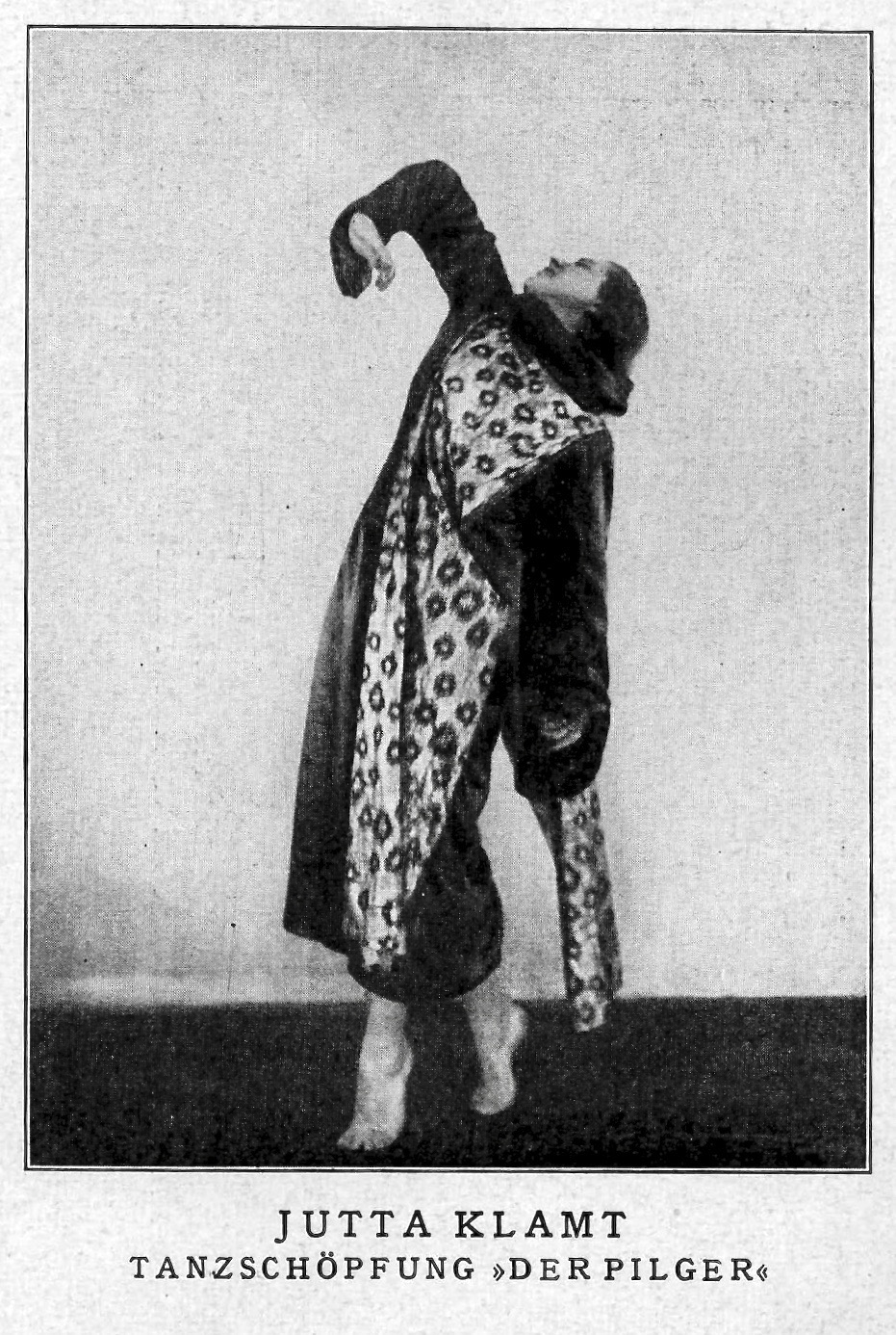 Jutta Klamt (1890–1970), deutsche Tänzerin, Choreographin und Tanzpädagogin, Gründerin der Jutta-Klamt-Schule (1920), der Jutta-Klamt-Gemeinschaft und der Tanzgruppe Jutta Klamt